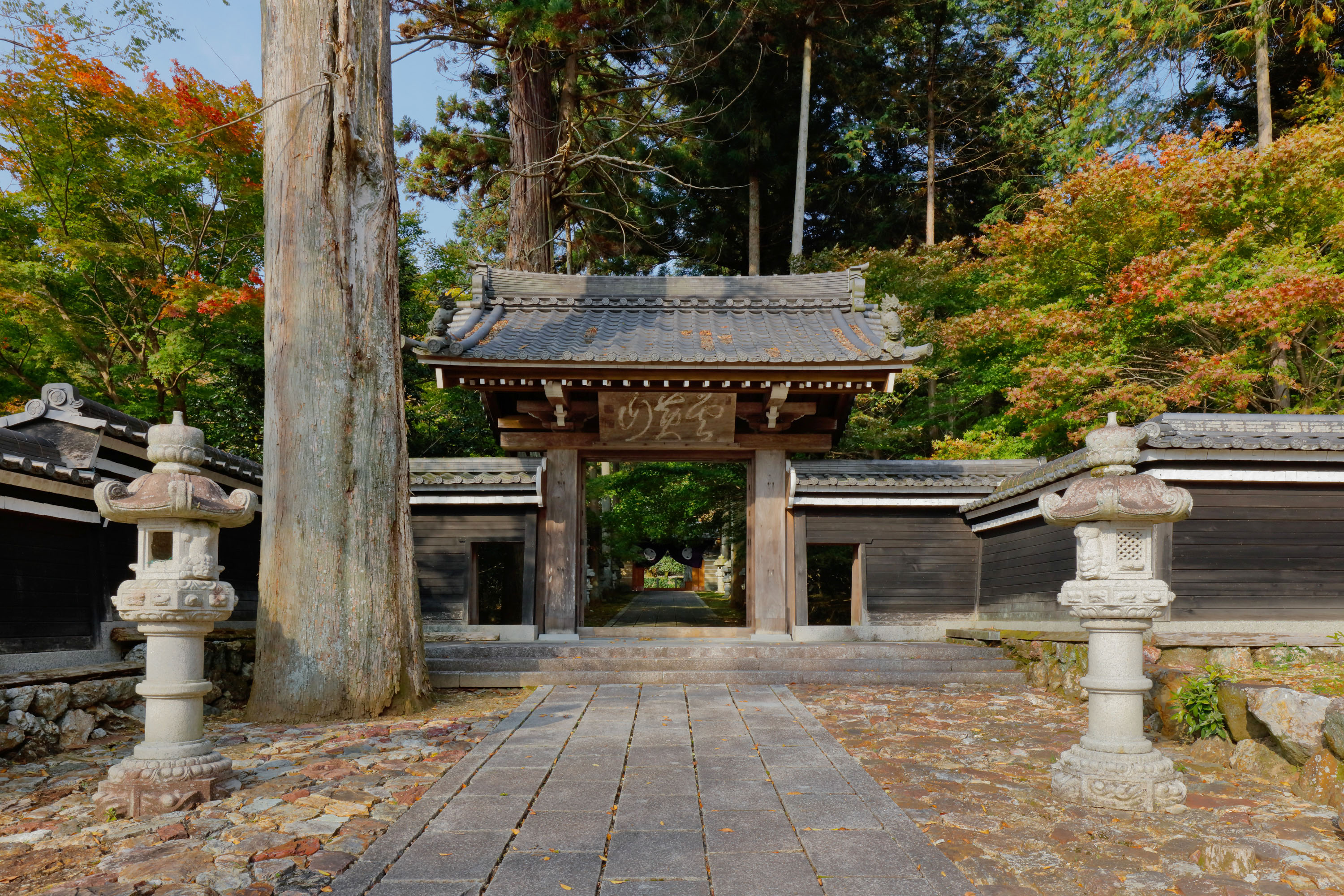 大智寺 (岐阜市)-山門